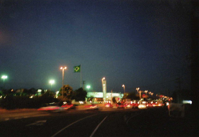 Avenida Roberto Freire, Natal, RN, Brasil.